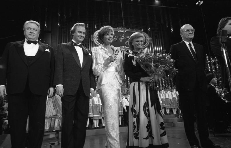 12.12.1986 Weihnachtskonzert "Lieder öffnen unsere Herzen". veranstaltet vom Kuratorium ZNS für Unfallverletzte mit Schäden des zentralen Nervensystems e. V. in der alten Oper Frankfurt. Die Präsidentin des Kuratoriums ZNS, Hannelore Kohl, lud zu diesem festlichen Abend Mitbürger, die sich helfend in den Dienst ihrer Mitmenschen stellen, ein, um ihnen für ihren Einsatz zu danken. Durch den Abend führte die Fernseh-Moderatorin, Caroline Reiber.